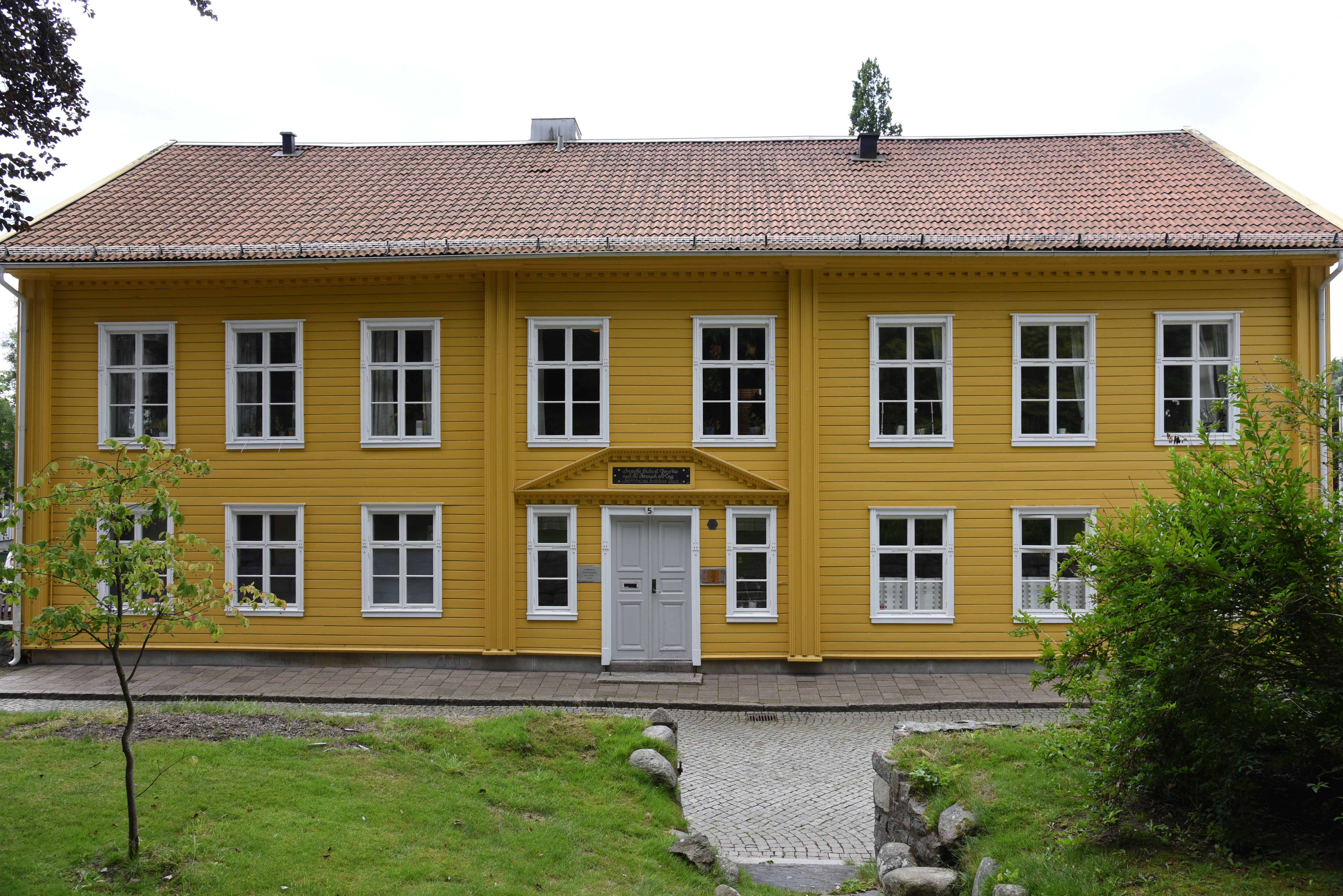 Det byggnadsminnesmärkta Zetterlöfska huset vid Västra gatan 5, kvarteret Rådhuset 12, i Kungälv.